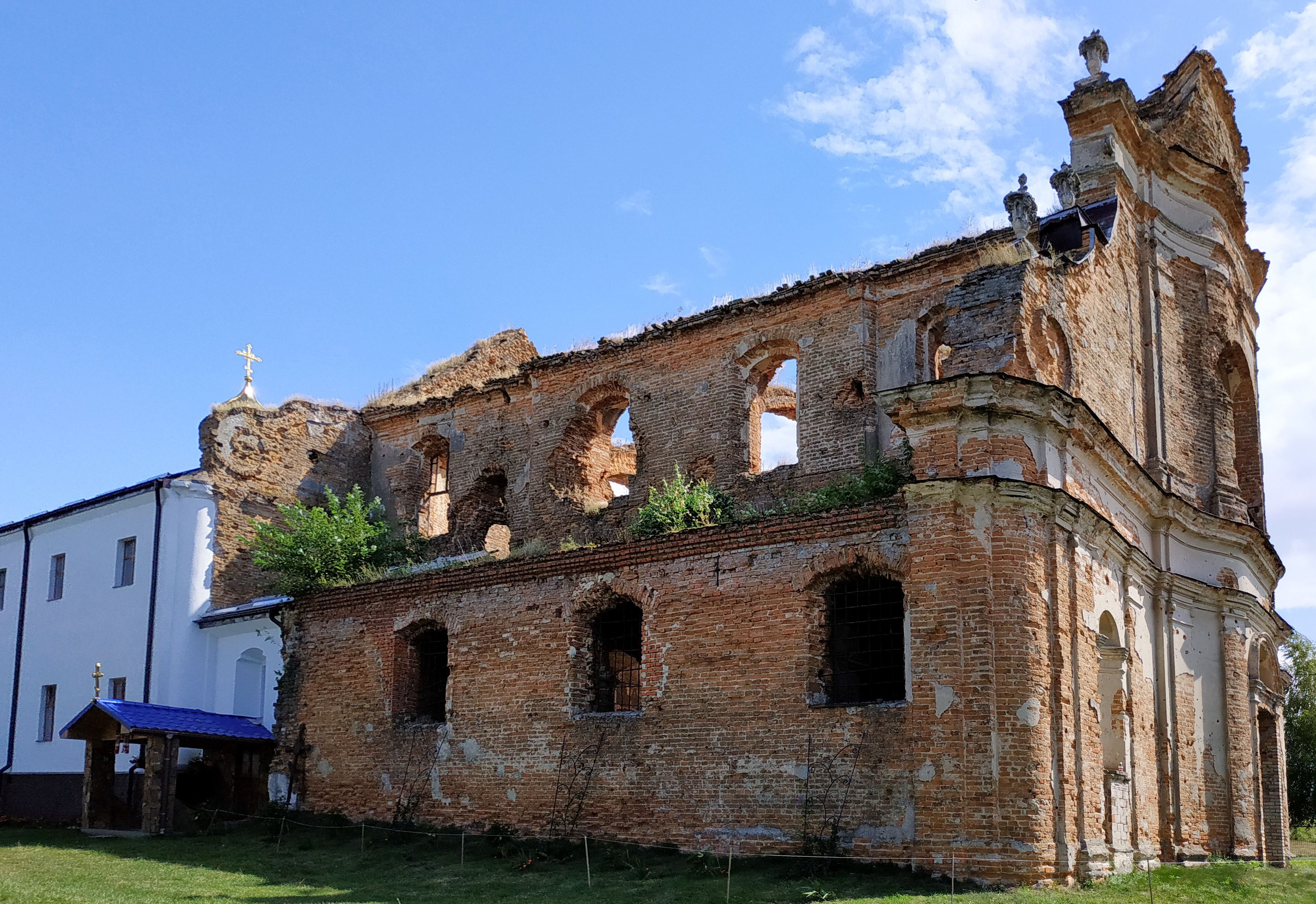 Загорівський монастир (1566 рік) - вигляд з північного заходу - Новий Загорів (на південній околиці села) Локачинський район Волинська область Україна